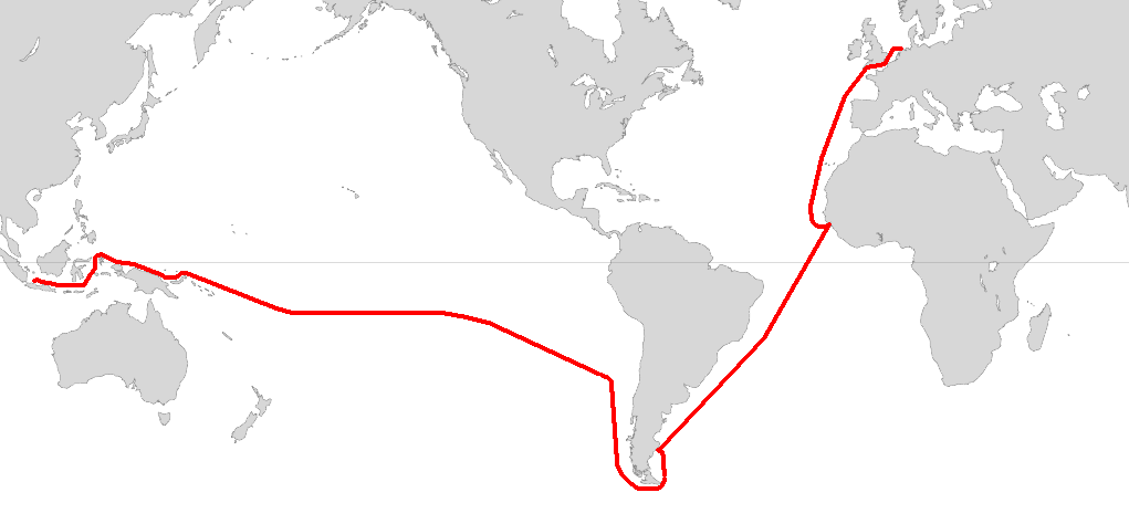 Jacob le Maire en Willem Cornelisz Schouten: Reis via Kaap Hoorn naar Indie (1615-1616)